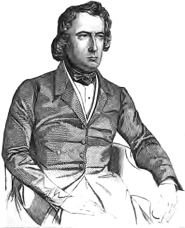 Isidore Justin Séverin Taylor, dit Le_baron_Taylor